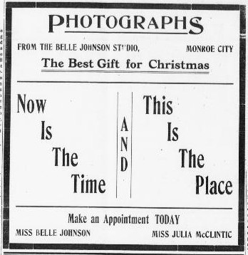 "Maintenant c'est le moment, maintenant c'est le lieu" : le studio de belle Johnson et Julia McClintic